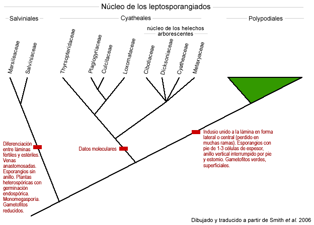 Árbol filogenético actualizado y taxonomía de Salviniales y Cyatheales en el "Núcleo de los leptosporangiados". Dibujado a partir de Smith et al. (2006).